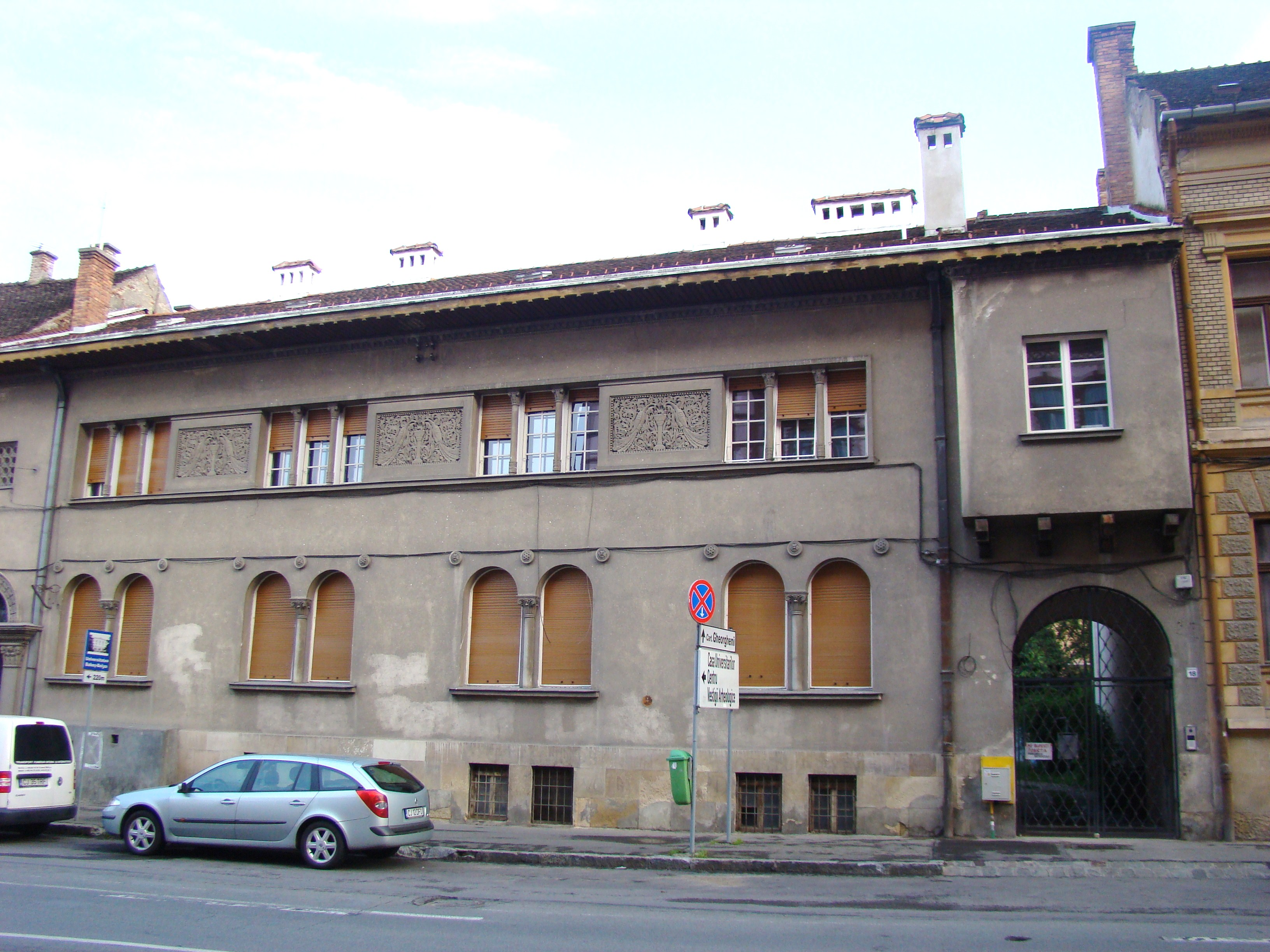 Casă monument istoric str.Avram Iancu, nr.16-18